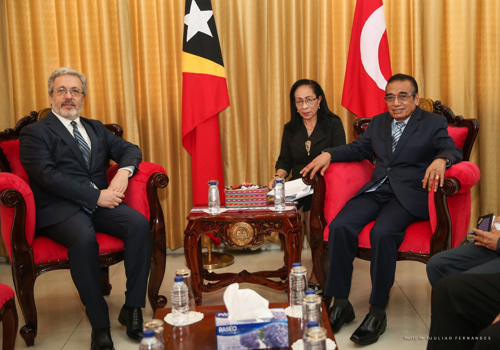 Mahmud Erol Kiliç bei der Übergabe seiner Akkreditierung als türkischer Botschafter in Osttimor